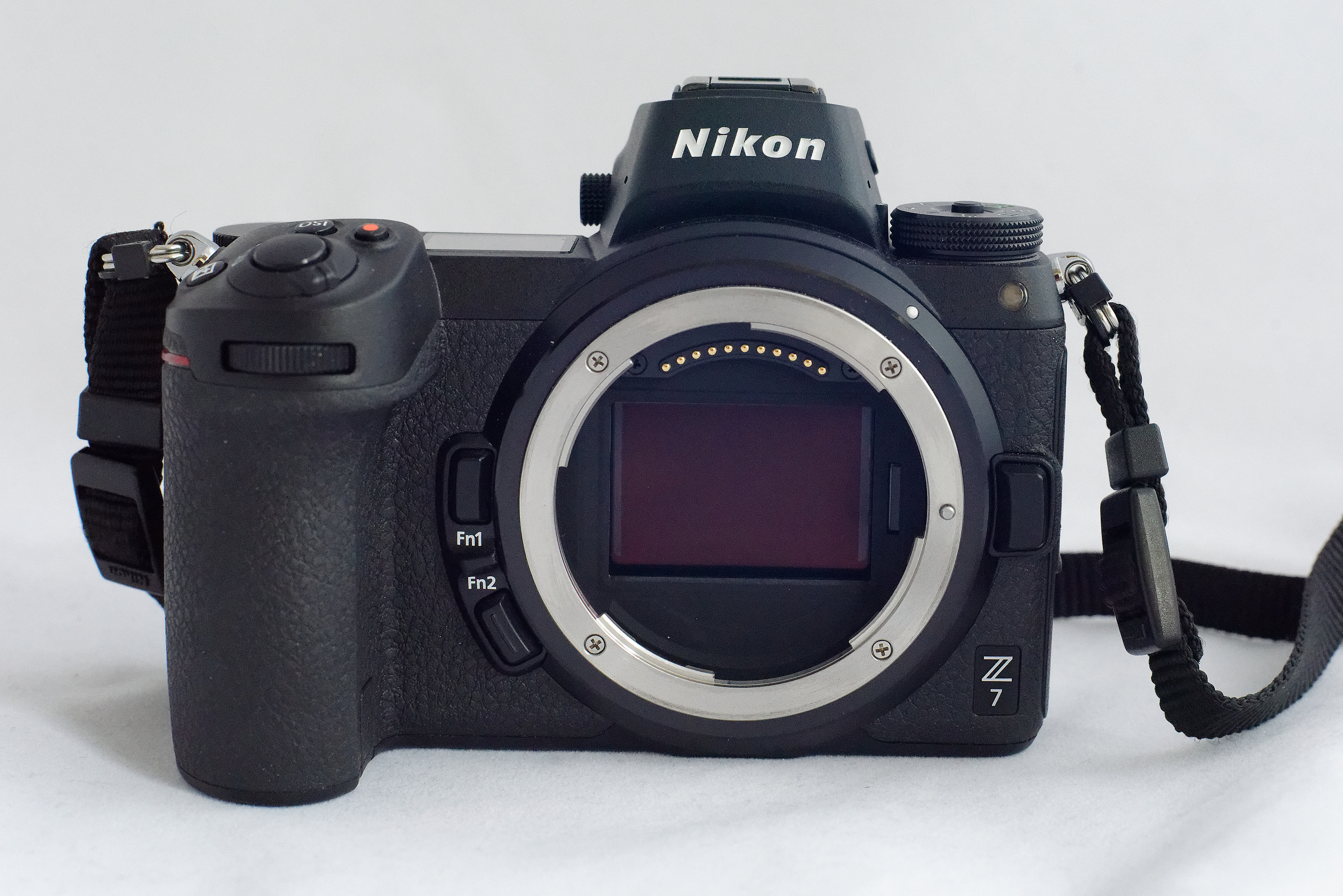 Nikon Z 7 Front